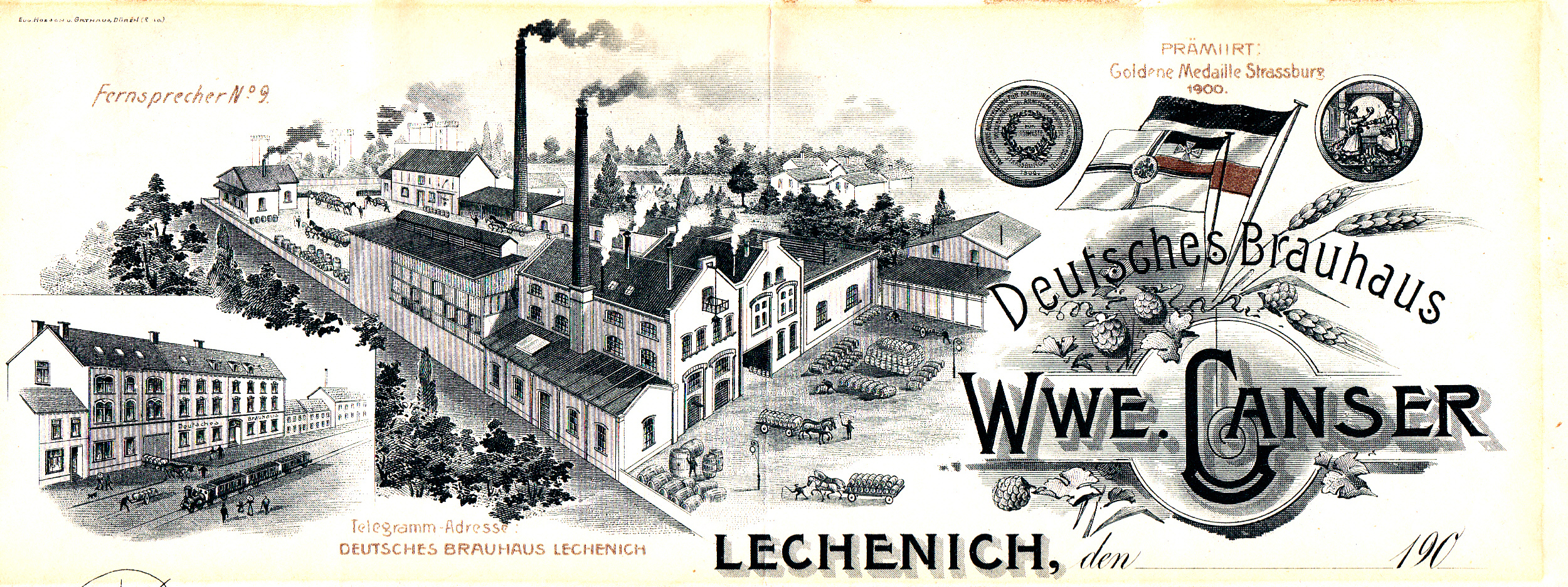 Rechnungskopf der Brauerei Ganser